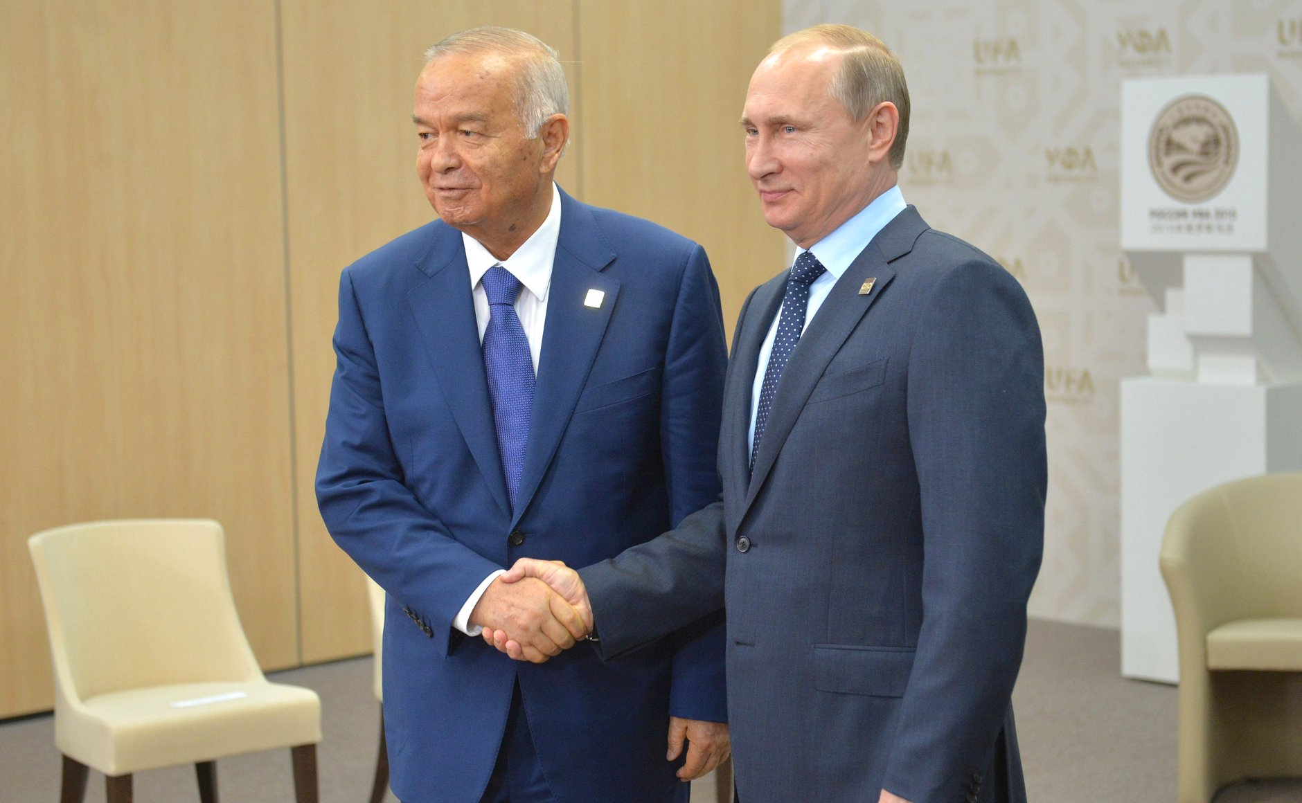 Президент России Владимир Путин с Президентом Республики Узбекистан Исламом Каримовым.